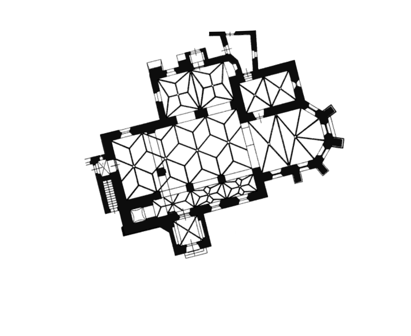 Půdorys plán